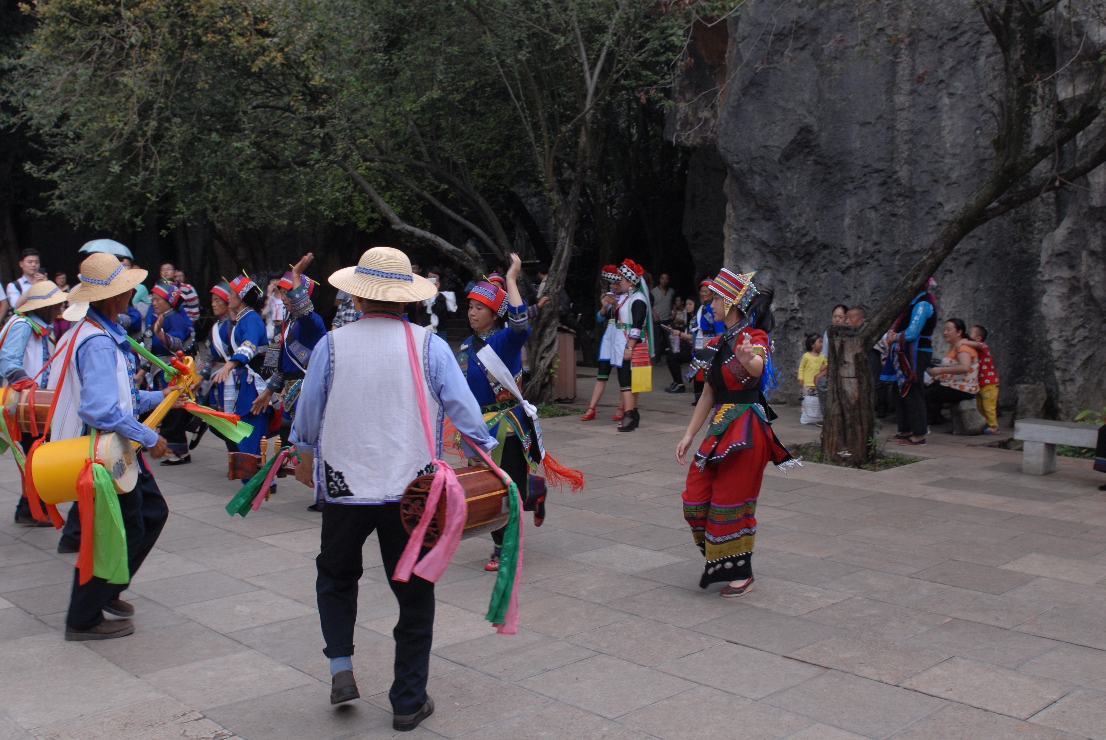 中文（中国大陆）: 石林彝族撒尼人的舞蹈